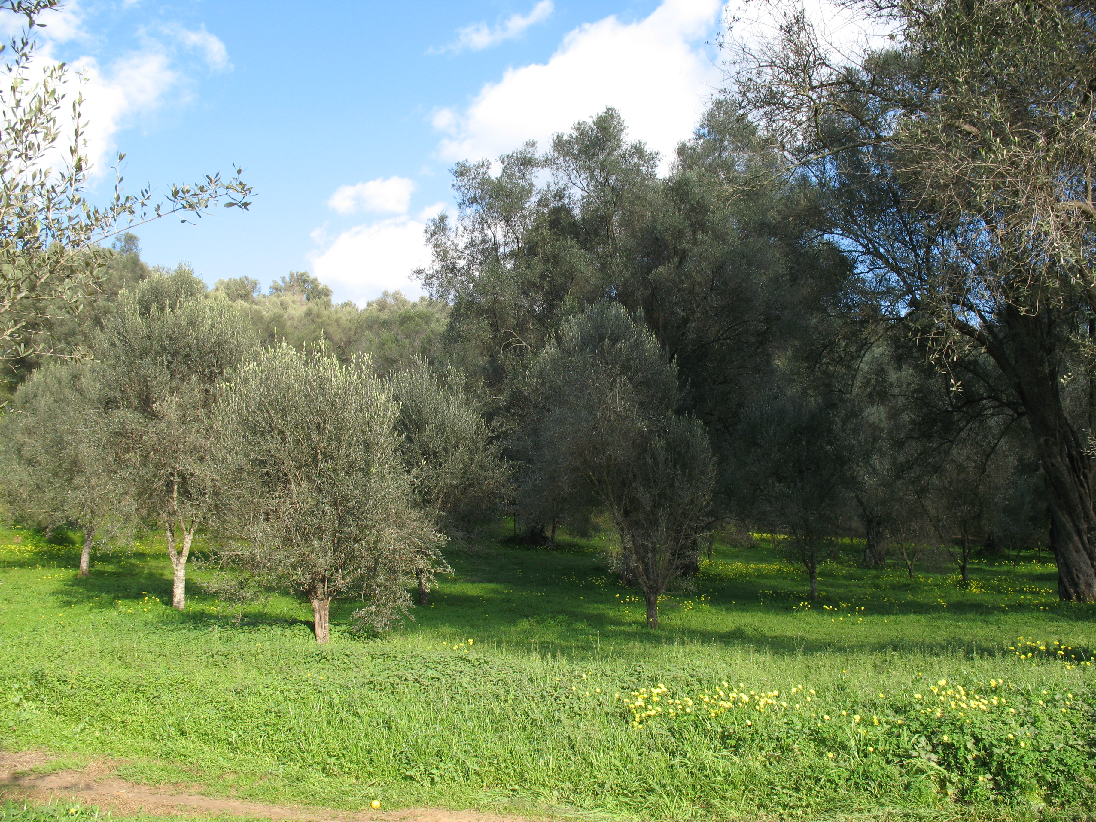 Piana di Gioia Tauro, Uliveti tra Rizziconi e Gioia Tauro